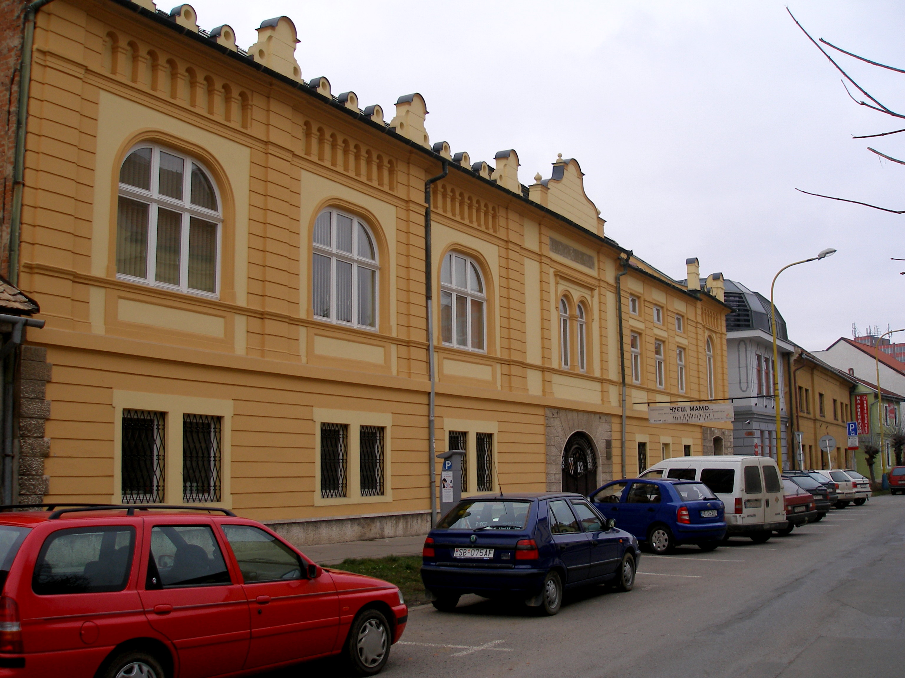 Ulica Jarková v meste Prešov.